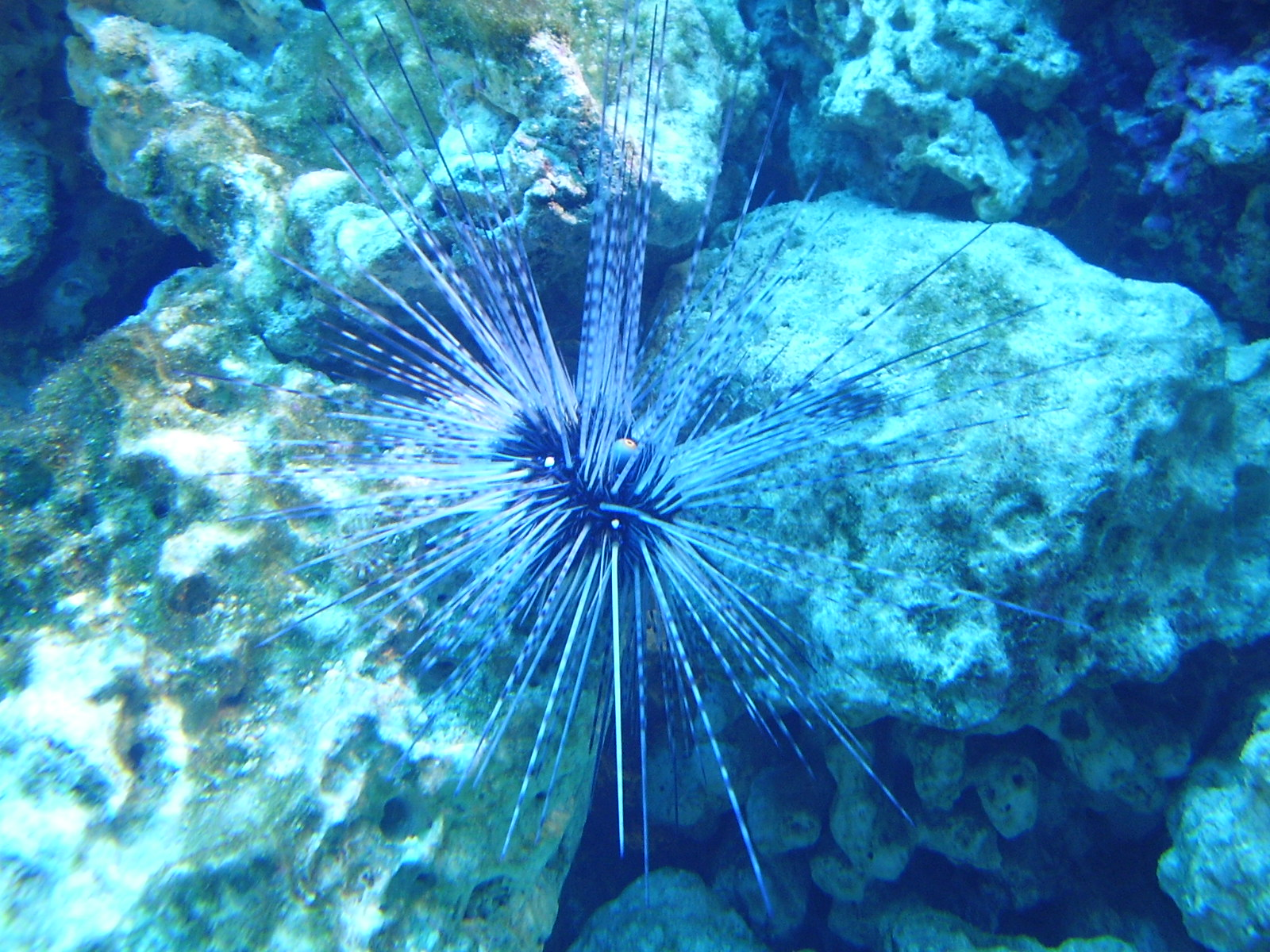 Igielnik (Diadema setosum)